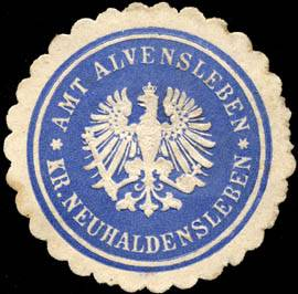 Sealing stamp Title: Amt Alvensleben - Kreis Neuhaldensleben Description: blau, weiß, geprägt Place: Alvensleben size: 4 cm